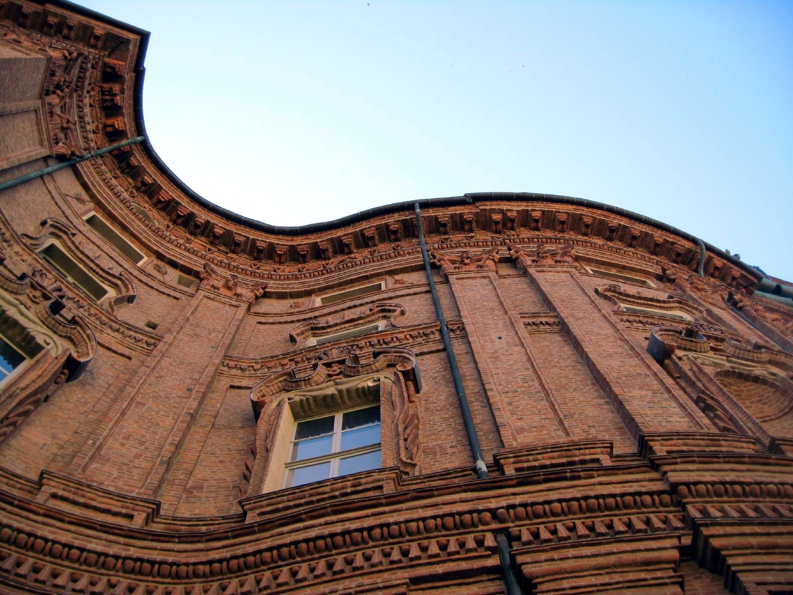 Palazzo Carignano, Torino